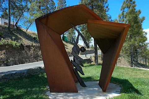 Monumento a los piqueros de Manolo González